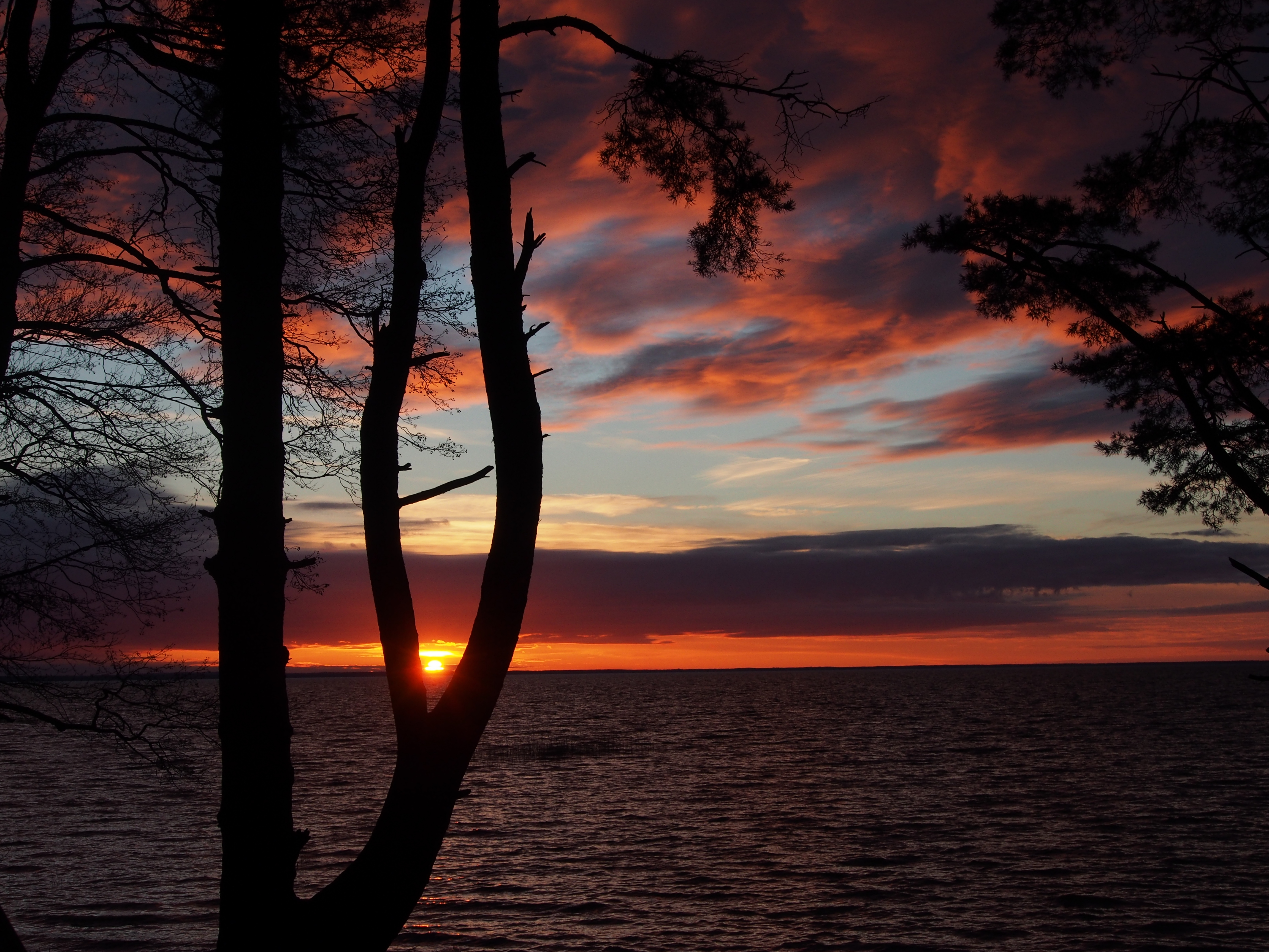 Võrtsjärve hoiuala (Viljandi)